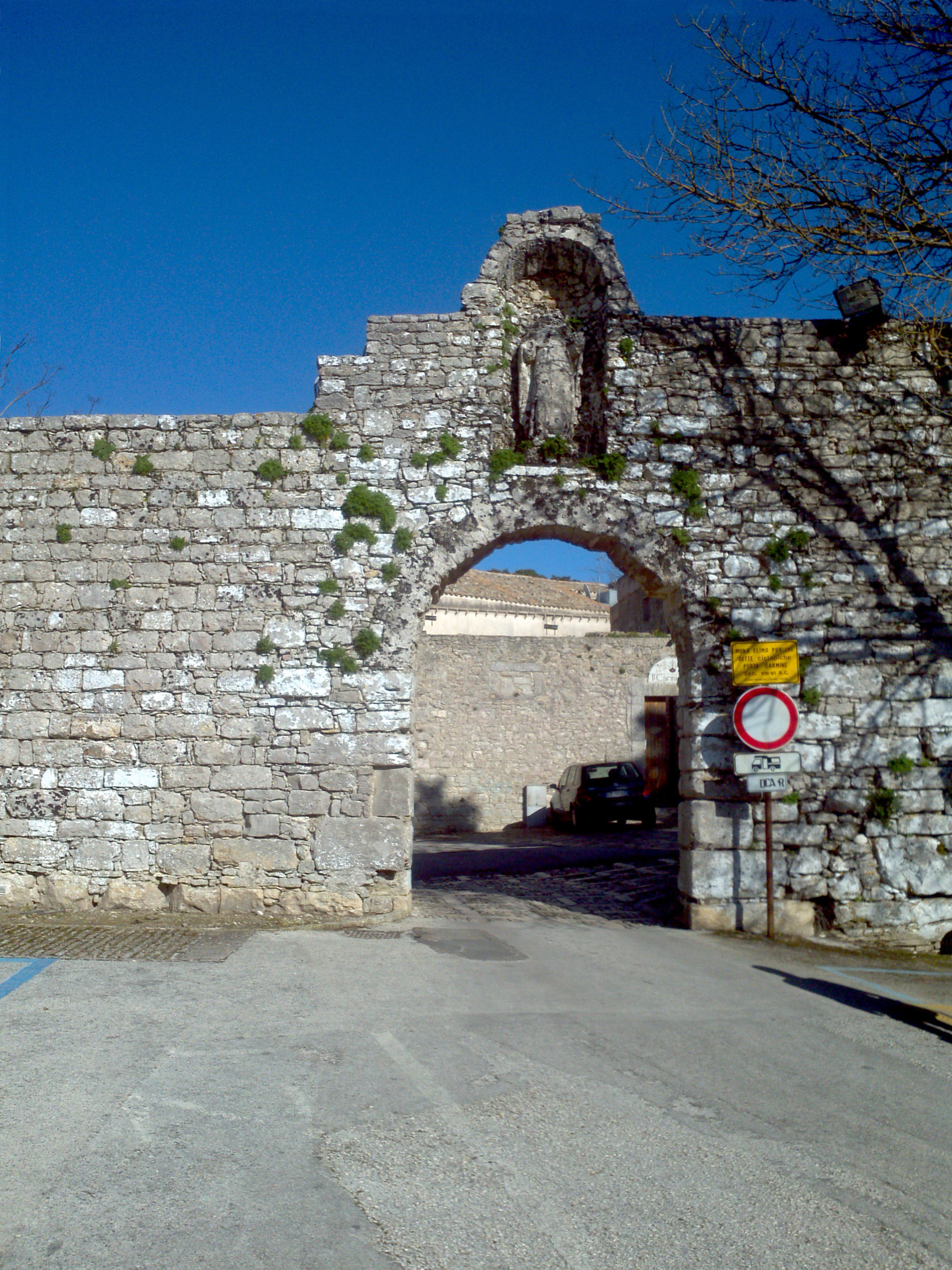 Porta Carmine, Stadtmauer von Erice, Sizilien